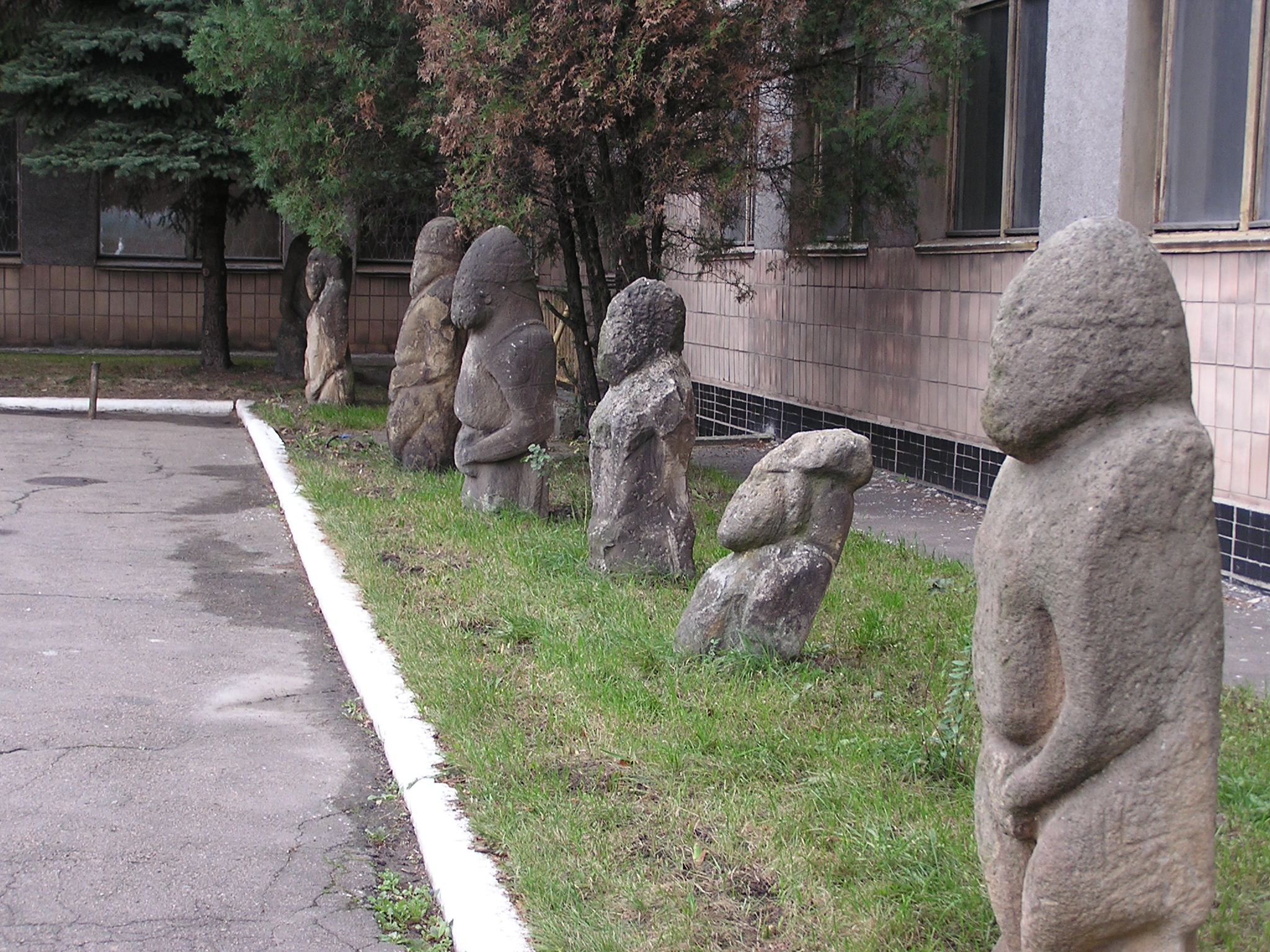 Каменная баба у здания Донецкого областного краеведческого музея